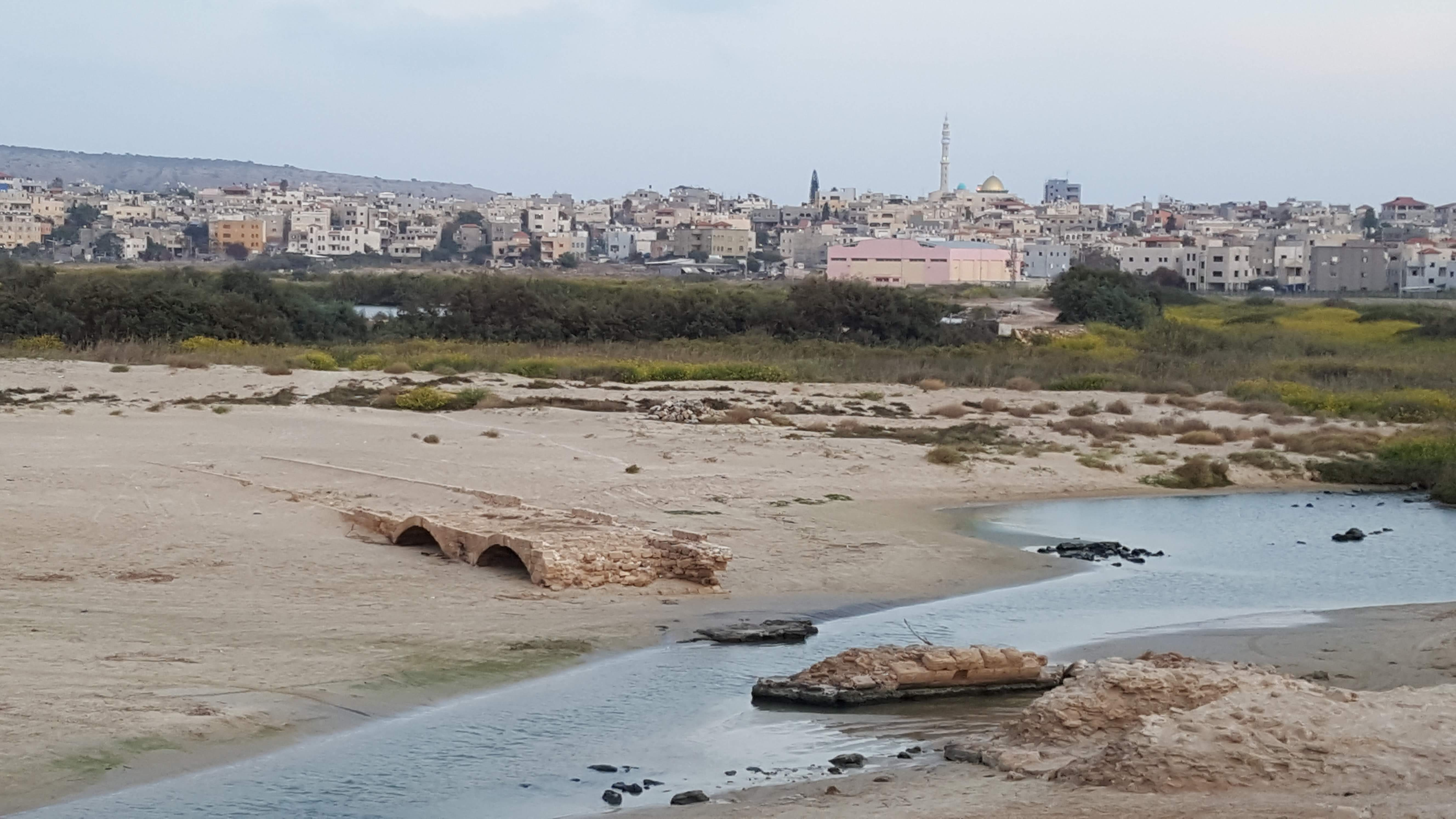 ג'סר א-זרקא - תל תנינים